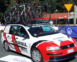 Wóz techniczny grupy Ceramica Flaminia